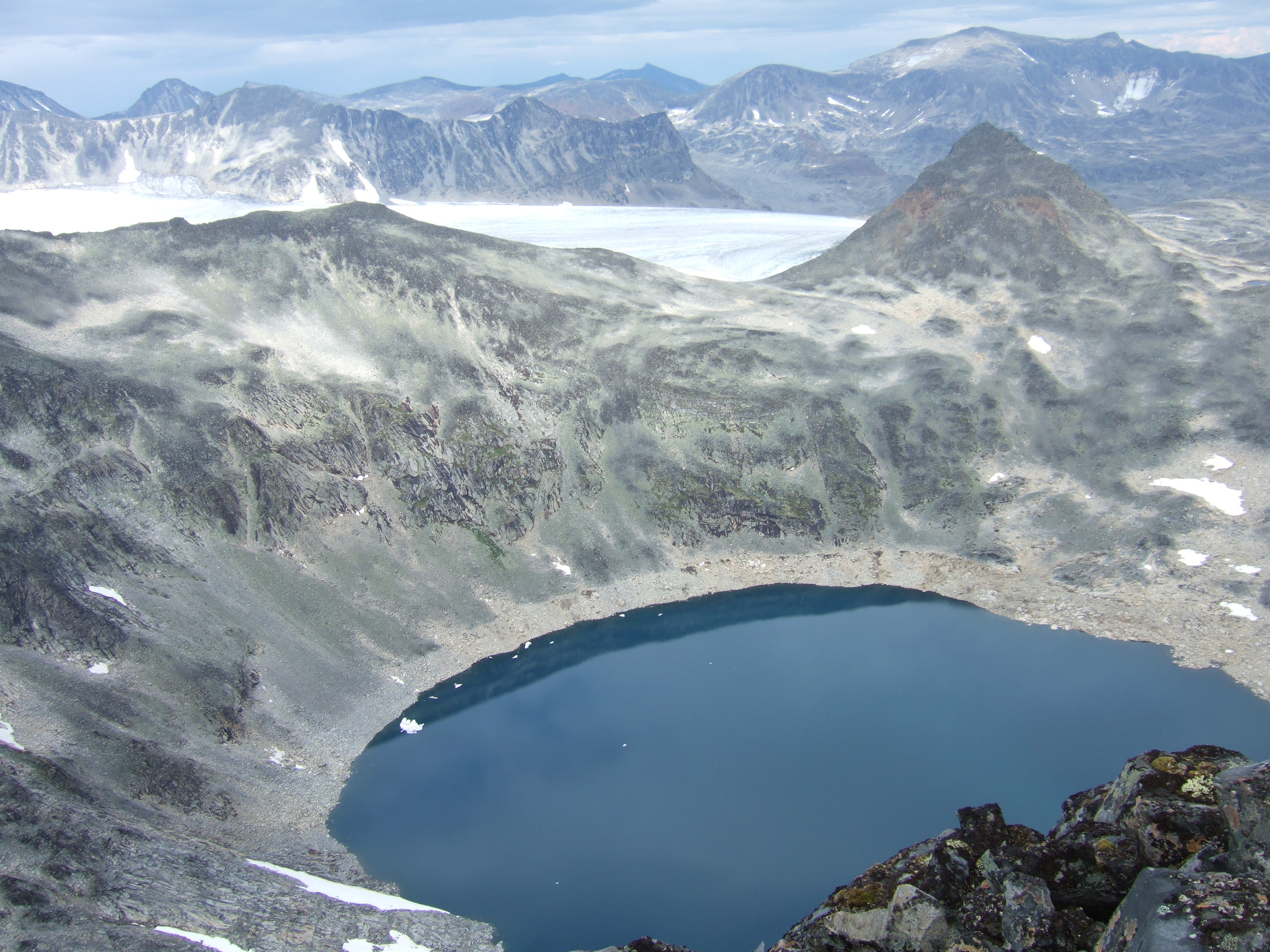 Hinnåtefjellet sett fra Semeltinden, Jotunheimen.